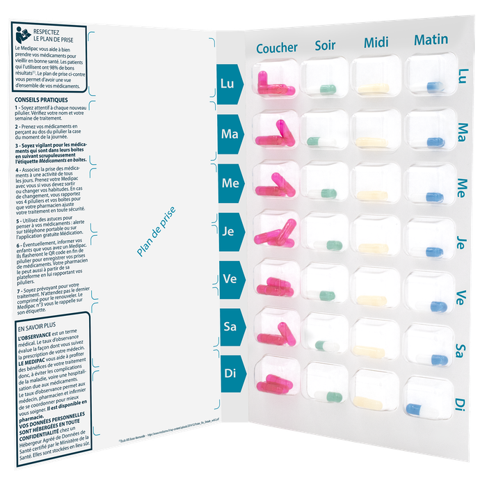 Intérieur du pilulier Medipac à usage unique de la société Medissimo